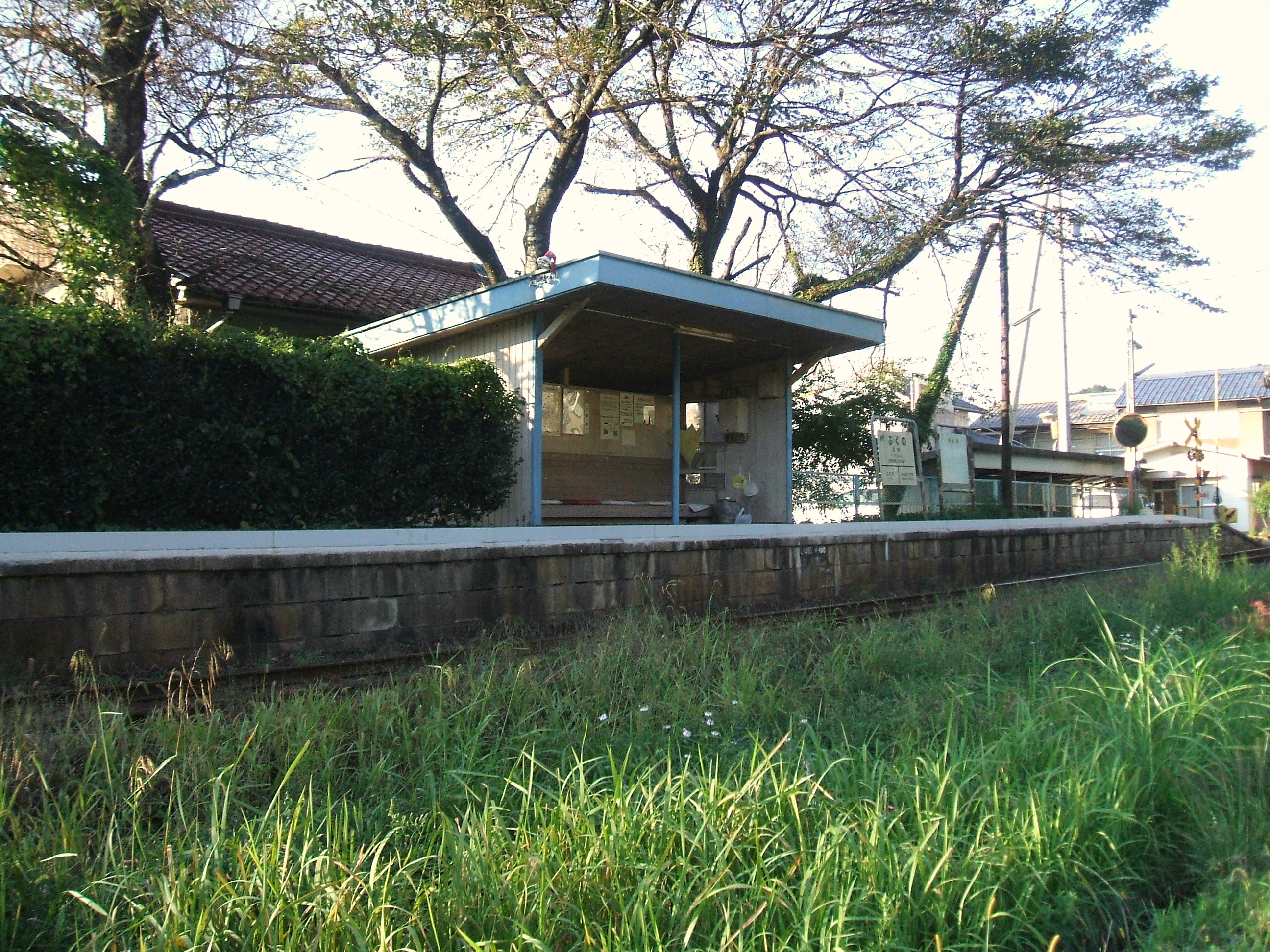 福野駅。